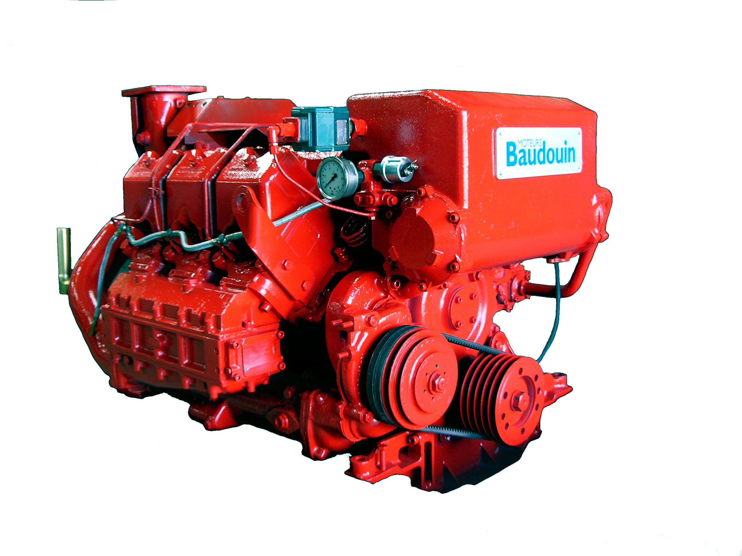 Moteur F11